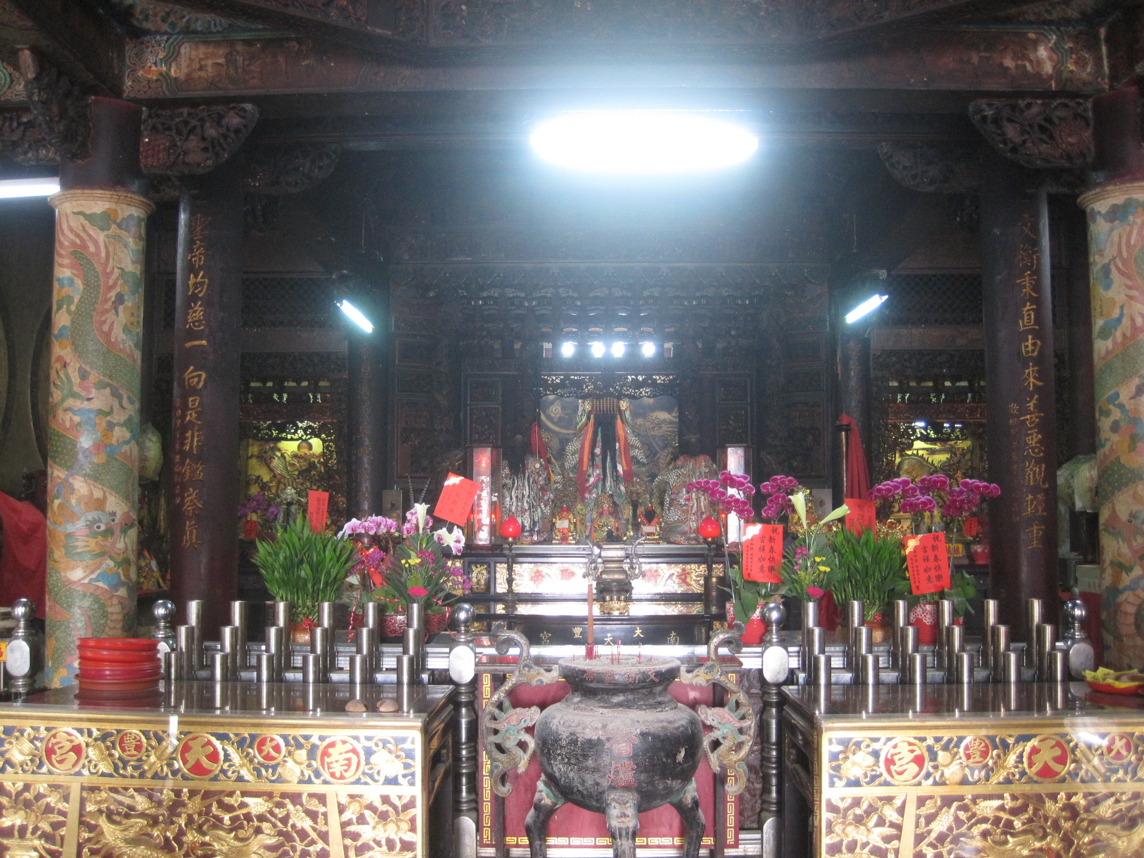 中文（台灣）: 大豐南天宮正殿